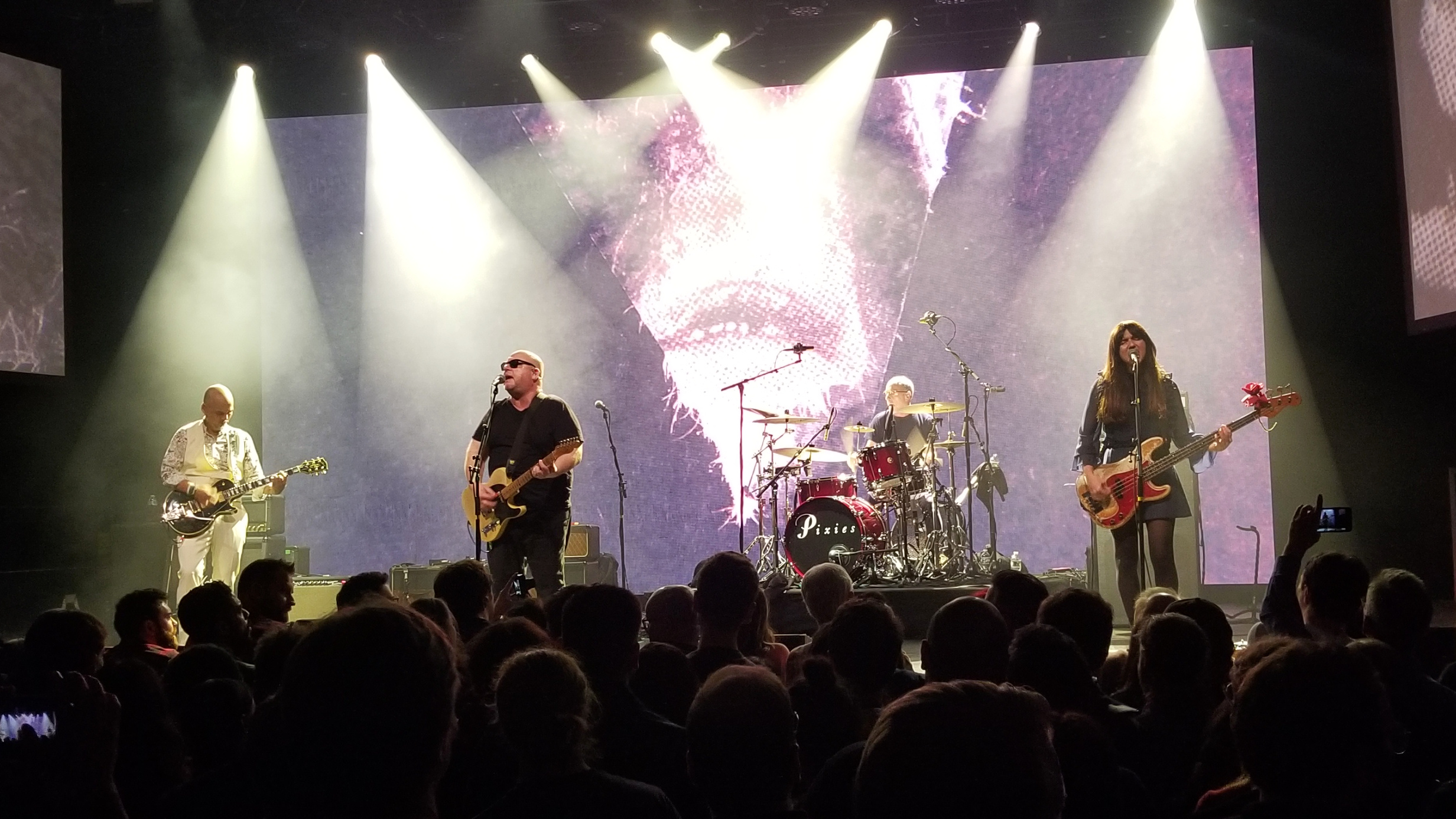 Pixies @ Brooklyn Steel, Brooklyn, 11/19/2018